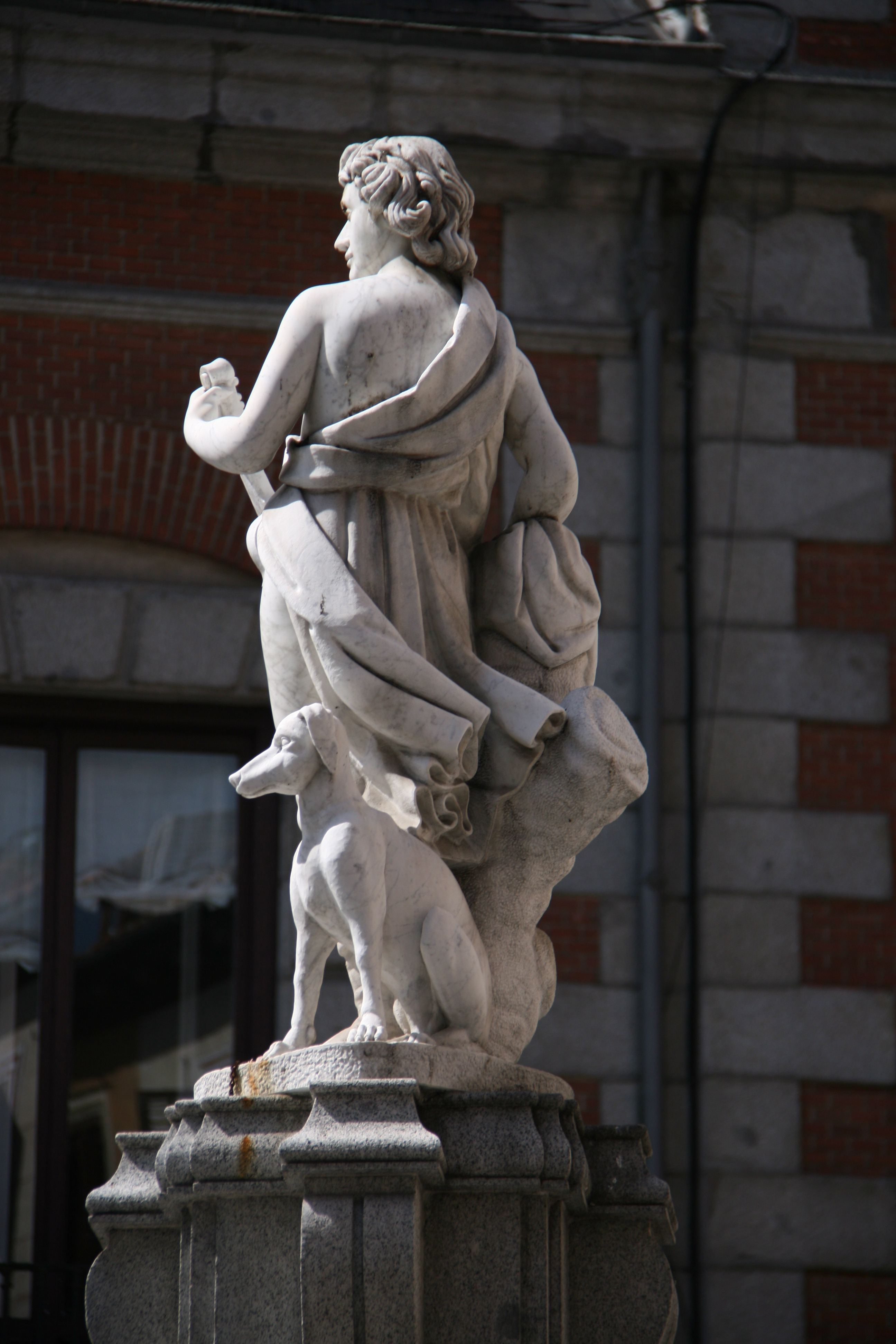 Fuente de Orfeo - Plaza de Provincia -Comenzó a construirse en 1617 y es obra de Juan de Capital y Alduayn y Martínez de Azpillaga según diseño de Juan Gómez de Mora.